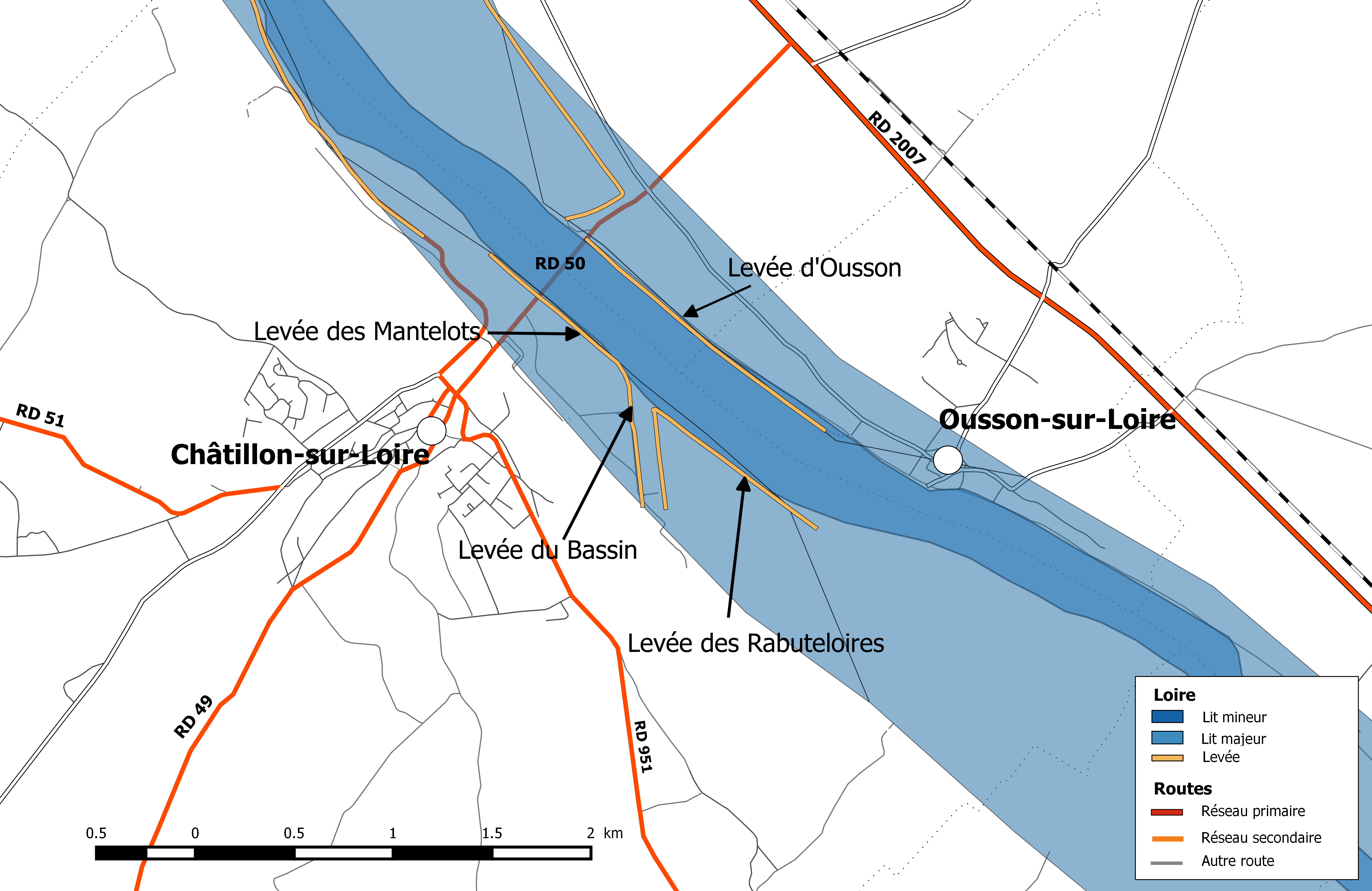 Système d'endiguement de la Loire dans le département du Loiret. Val de Chatillon.